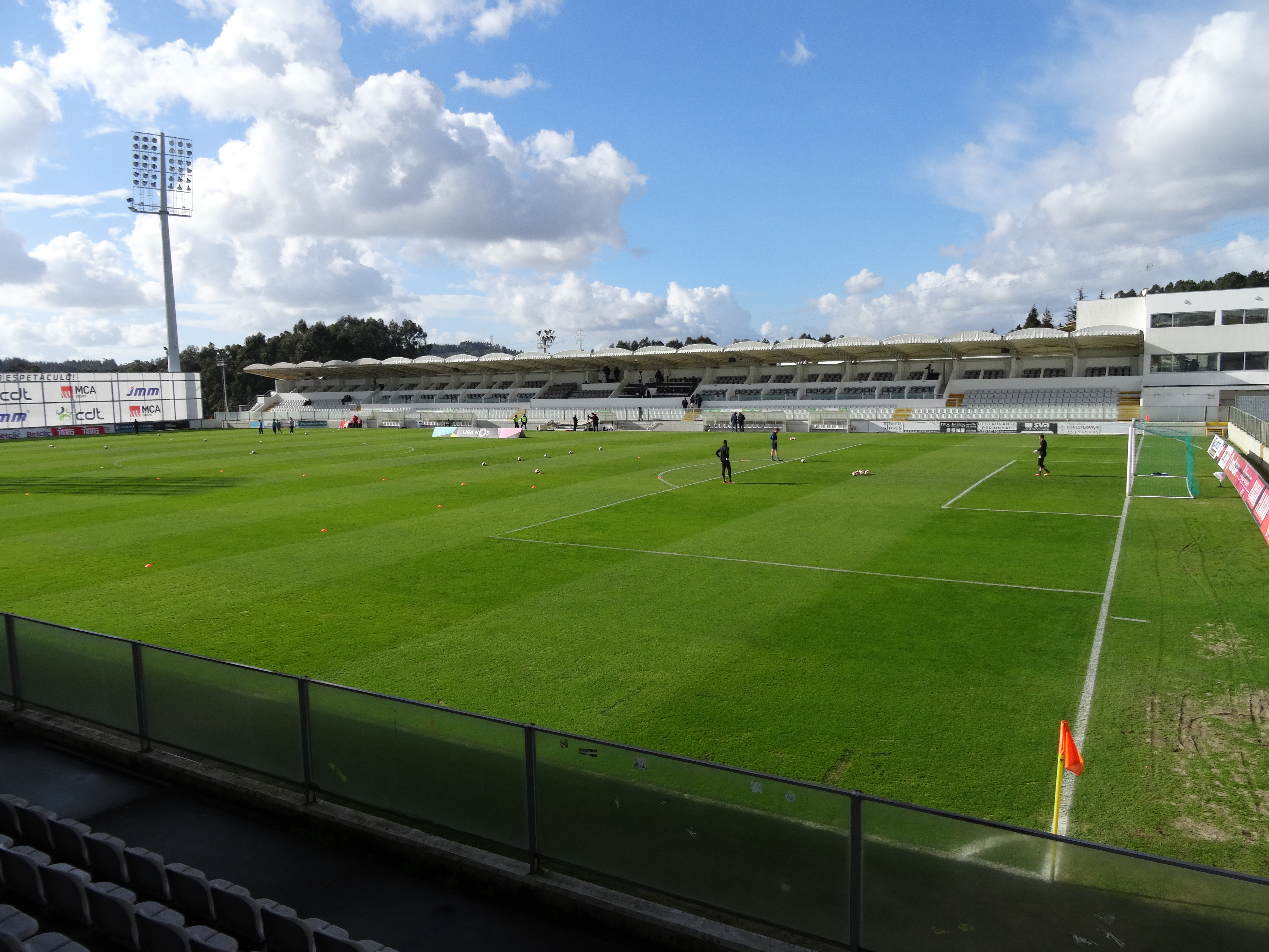 Blick auf die Haupttribüne - Estádio Comendador Joaquim de Almeida Freitas